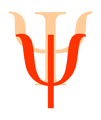 Greek letter